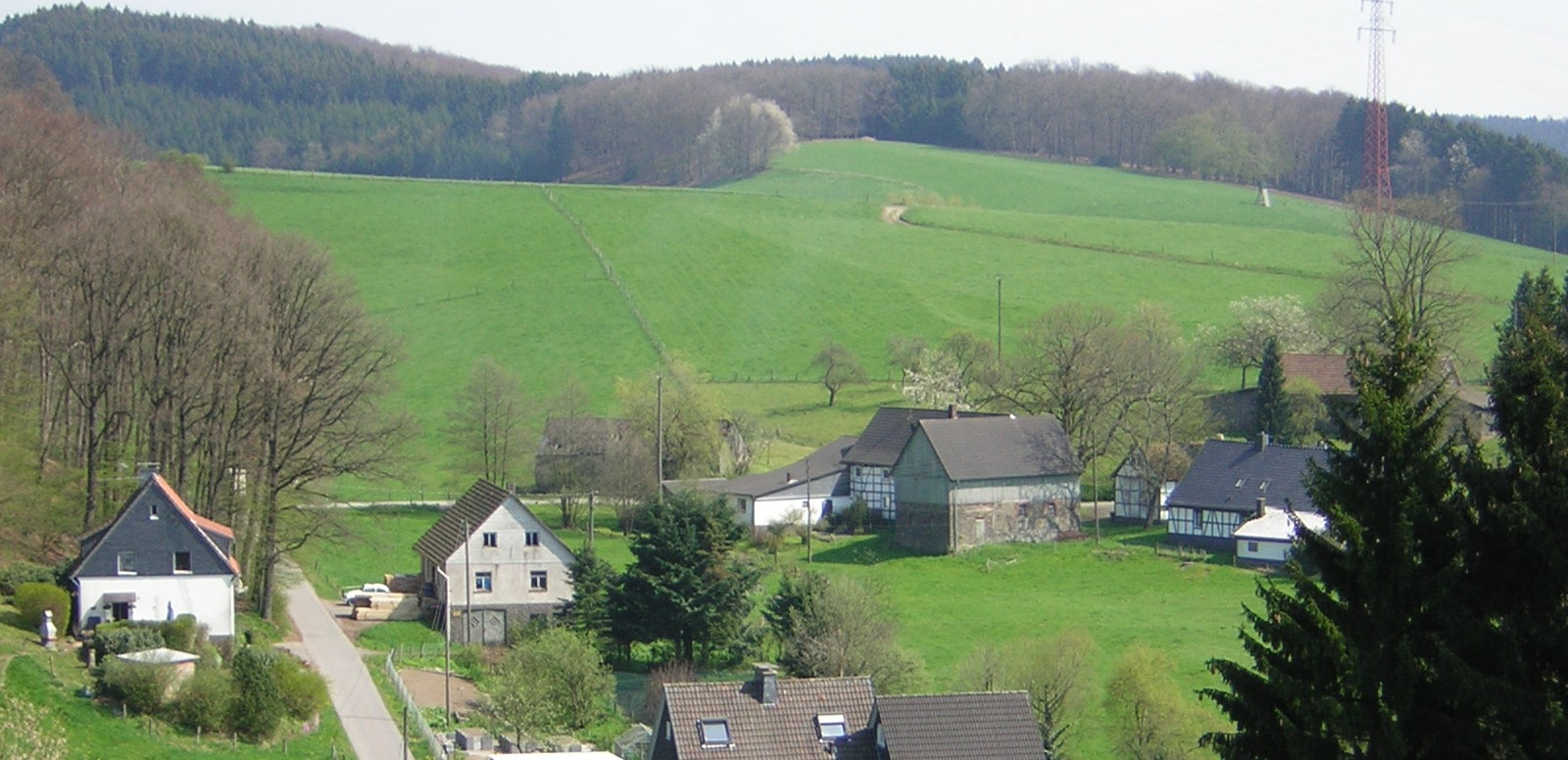 Hintermühle in Wipperfürth